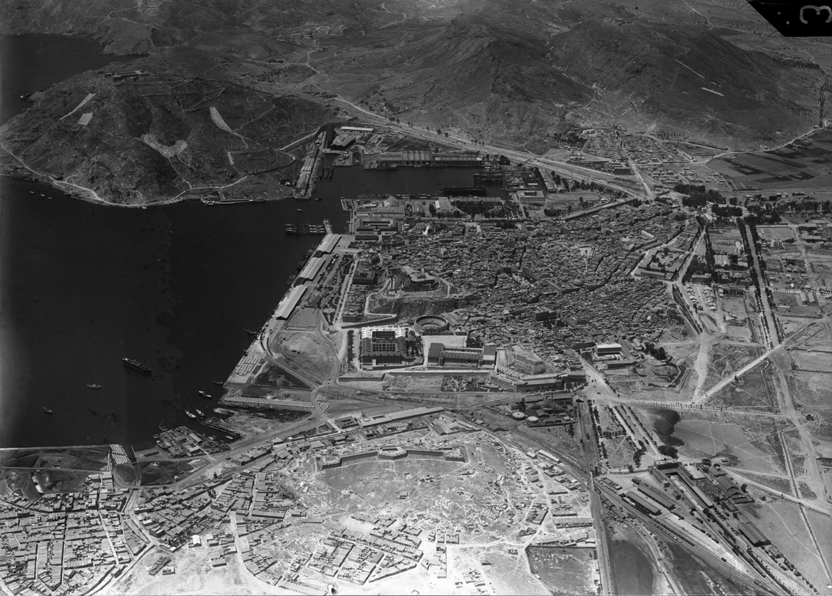 Fotografía aérea de Cartagena el 16 de junio de 1936.